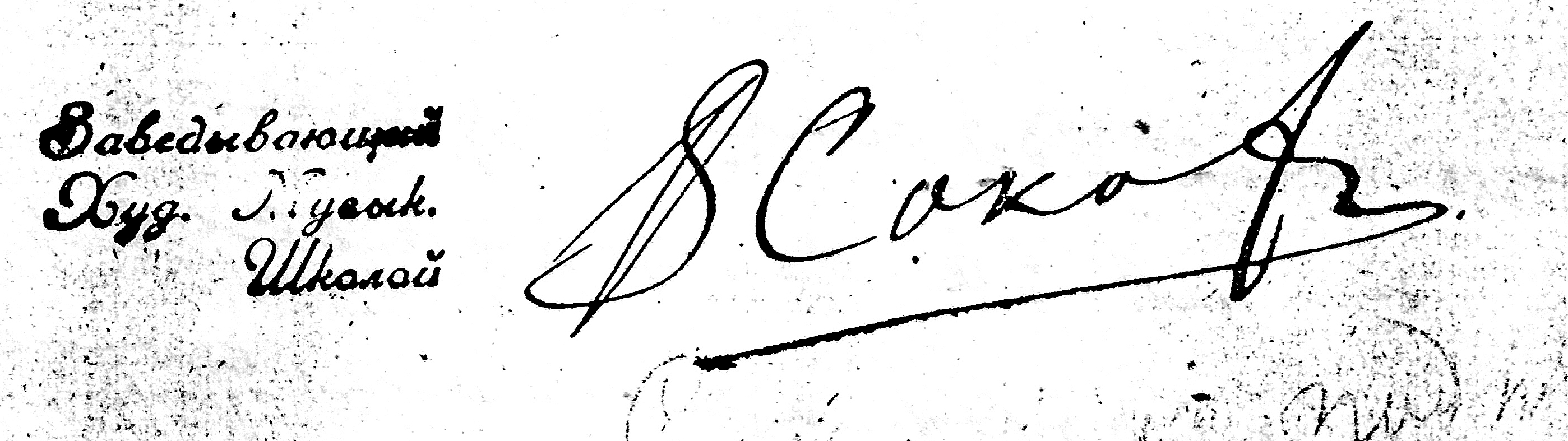 Подпись В.А. Соковнина на ходатайстве. 1931 г.